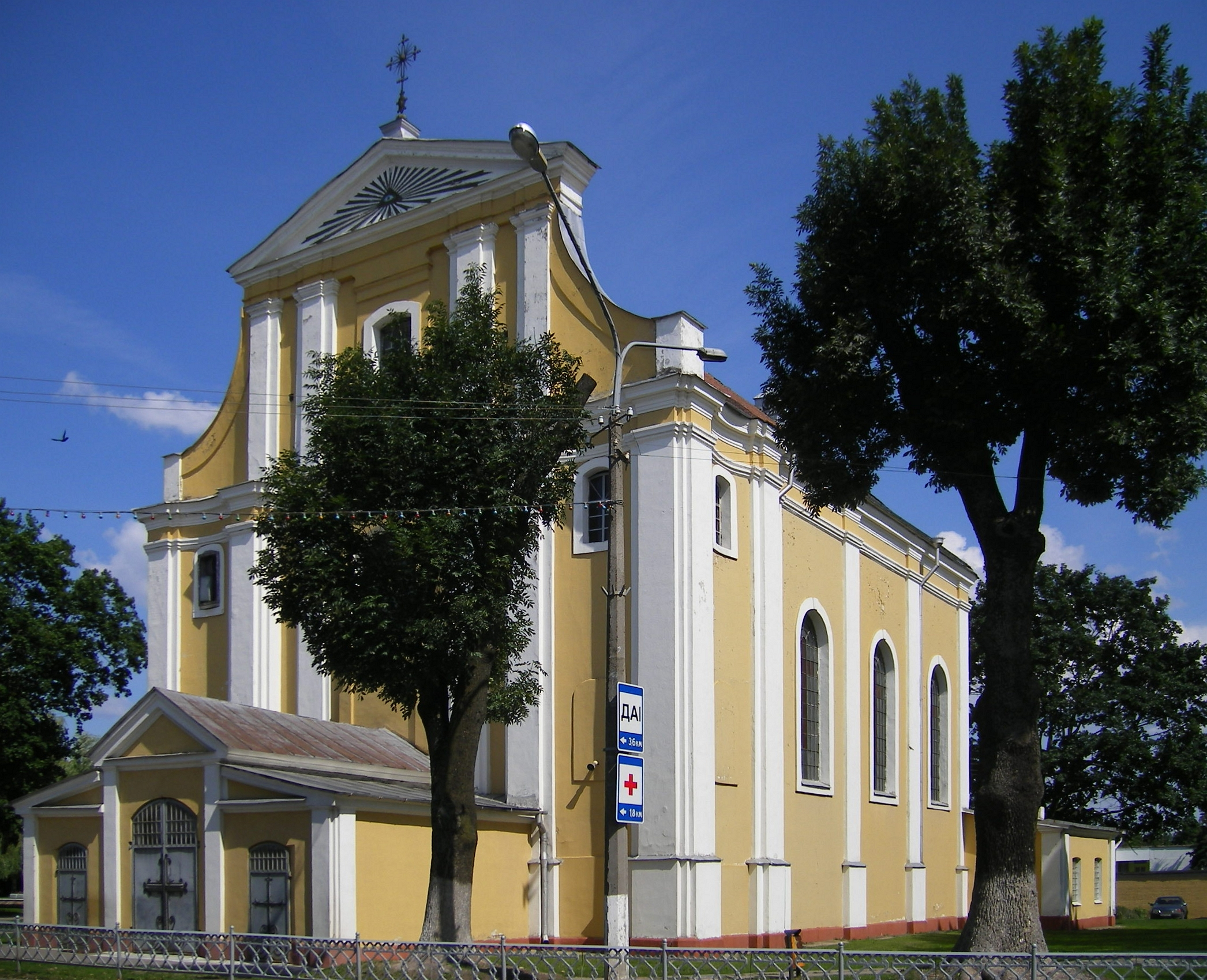 Krestovozdvizhensky Church, Lida